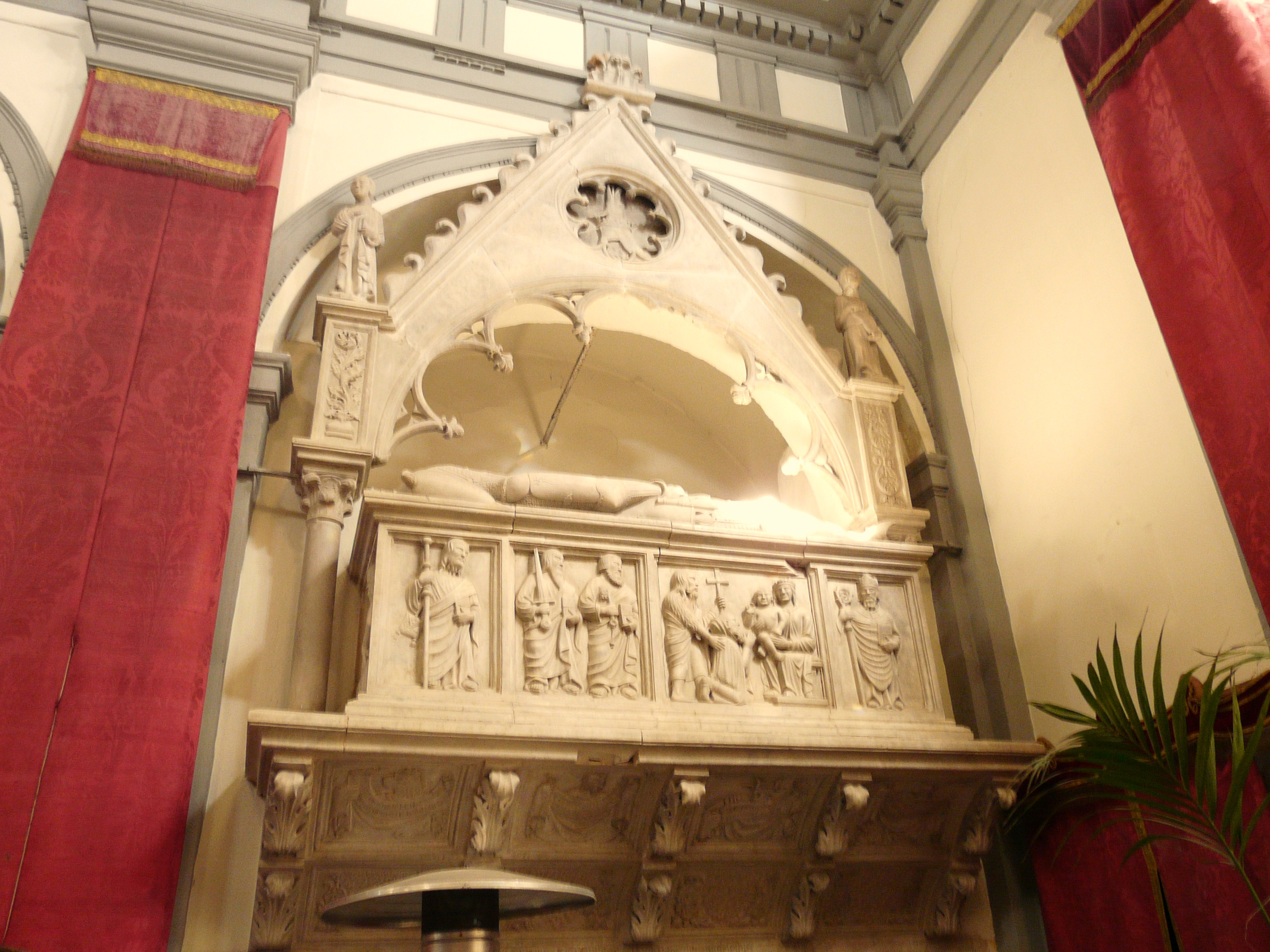 Chiesa-Santuario di San Remigio, Fosdinovo, Toscana, Italia